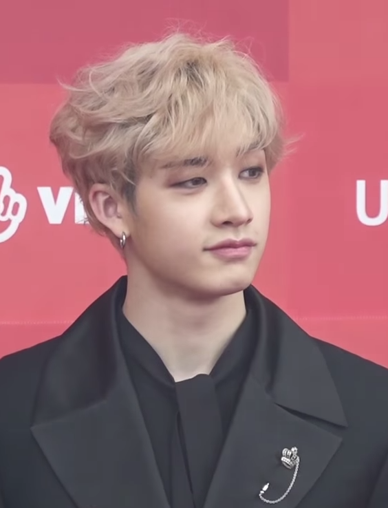 Stray Kids 方燦於2019年1月6日在第33屆金唱片獎頒獎典禮